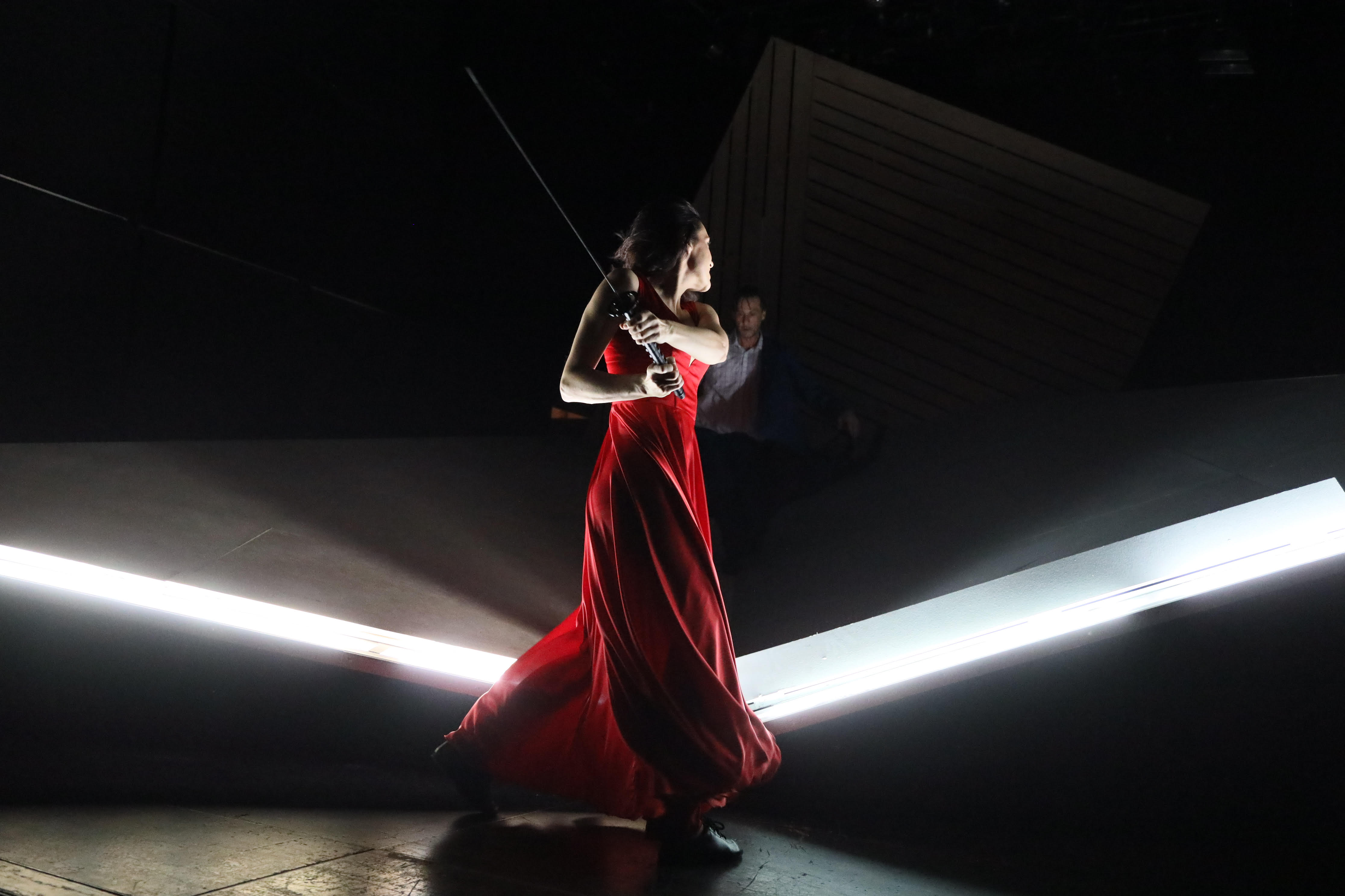 Livada puna tame- Narodno pozorište, 2019